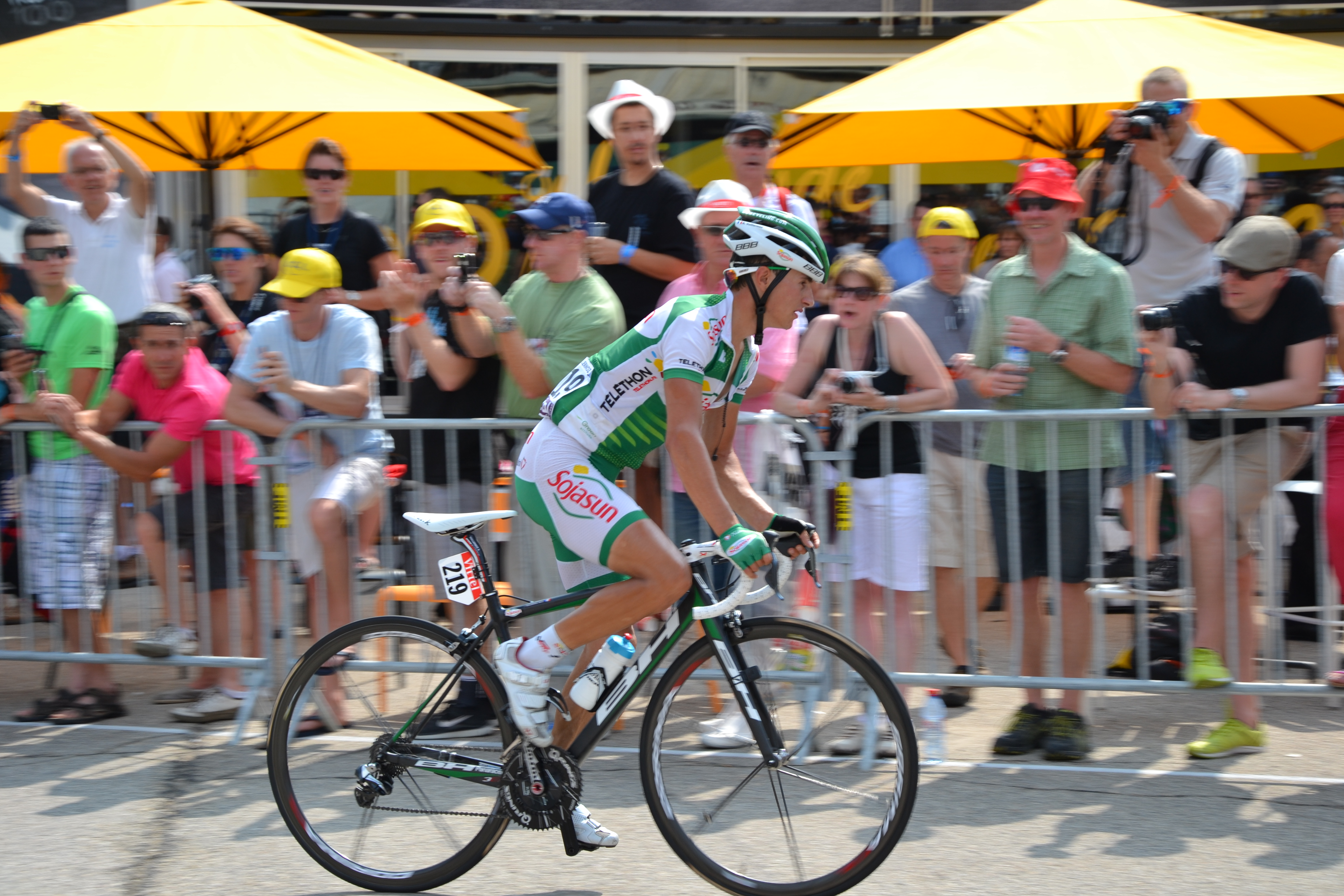 Au Chalet Reynard, lors de la 15ème étape du Tour de France 2013